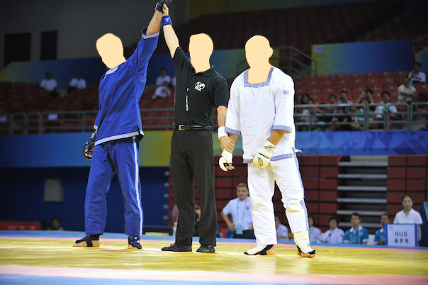 Tenues officielles des pancratiastes et de l'arbitre au Pankration.